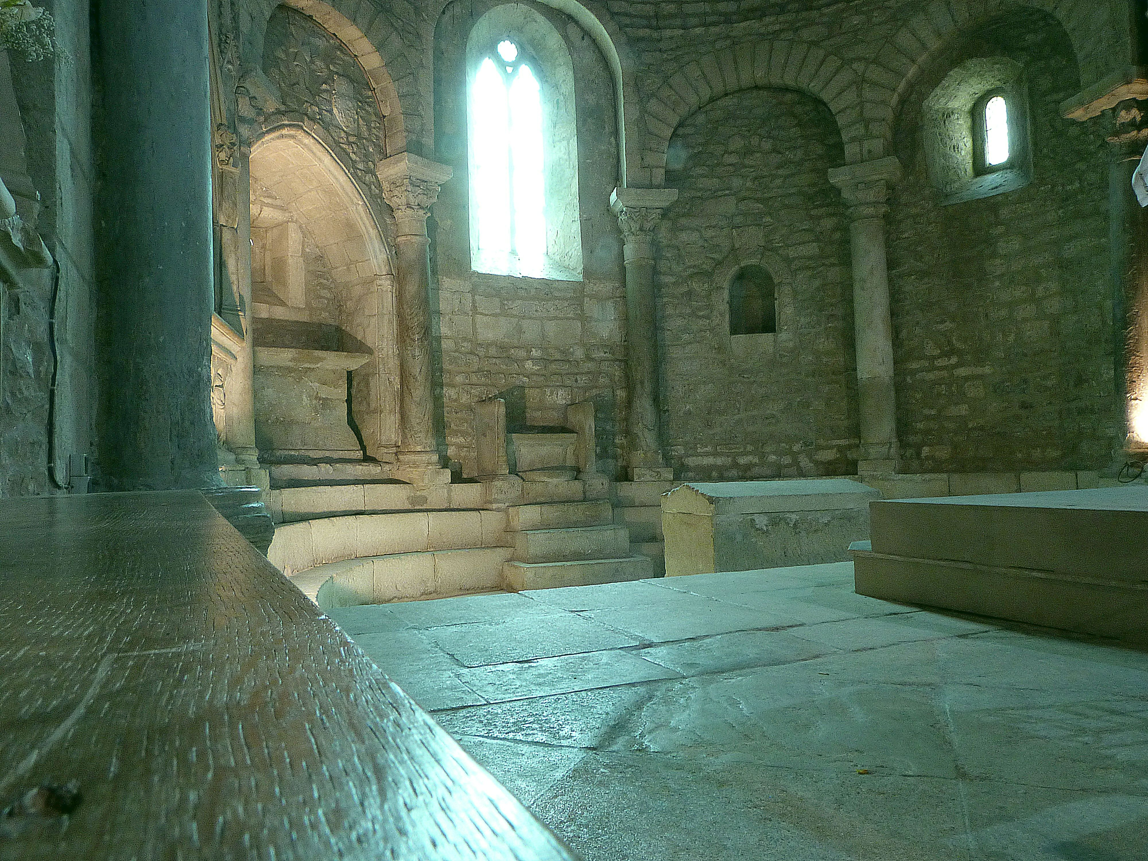 Vaison-la-Romaine: Cathédrale Notre-Dame-de-Nazareth